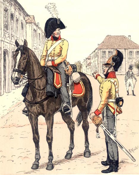 Knötel, Band XIII, Tafel 1: Brandenburgisches Kürassier-Regiment Juli und August 1809